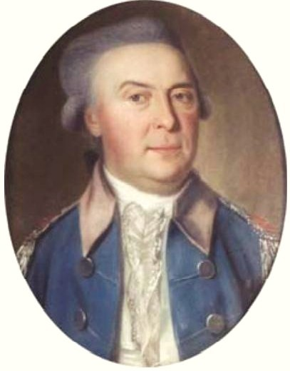 Николай Фёдорович Апраксин (1736—1792)